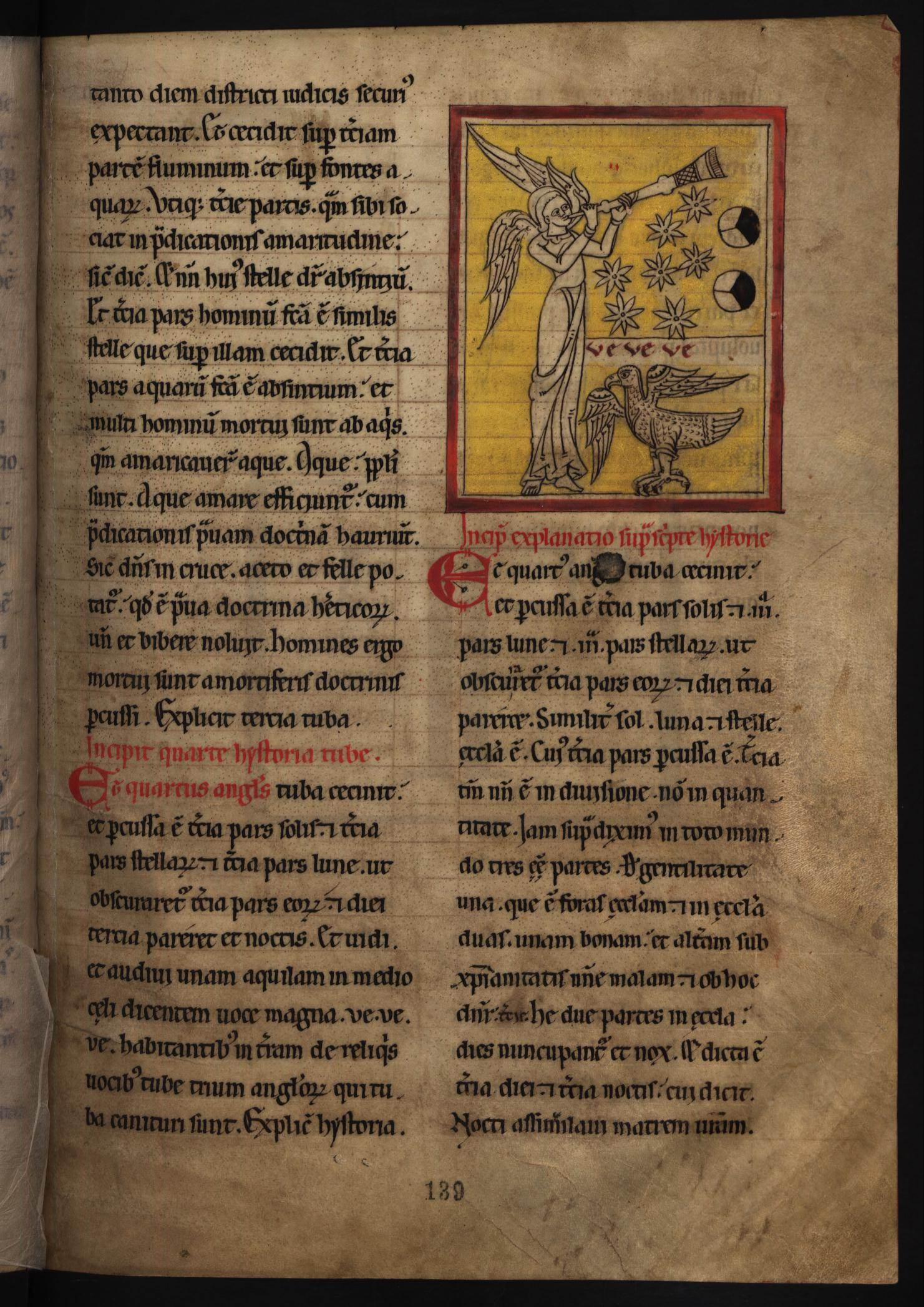 Apocalipse do Lorvão, O Quarto Anjo Toca a sua Trombeta (fl. 139)